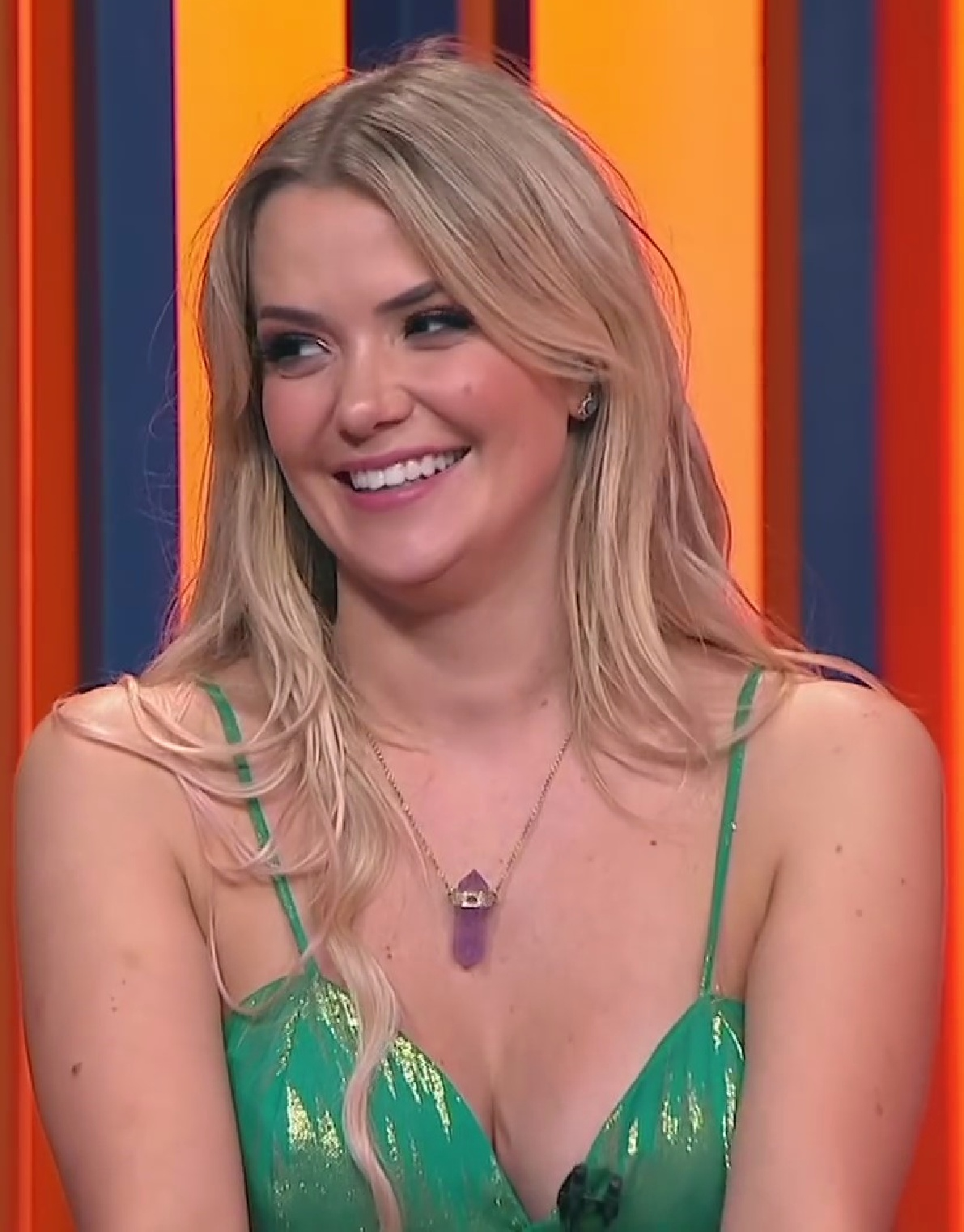 Marcela Mc Gowan durante a sua participação no programa A Eliminação, exibido no canal no YouTube do Multishow em 9 de abril de 2020.